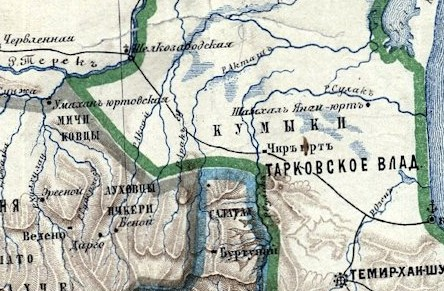 Граница Кумыкского округа и Ауха в 1870 году, Карта Кавказского Края 1870